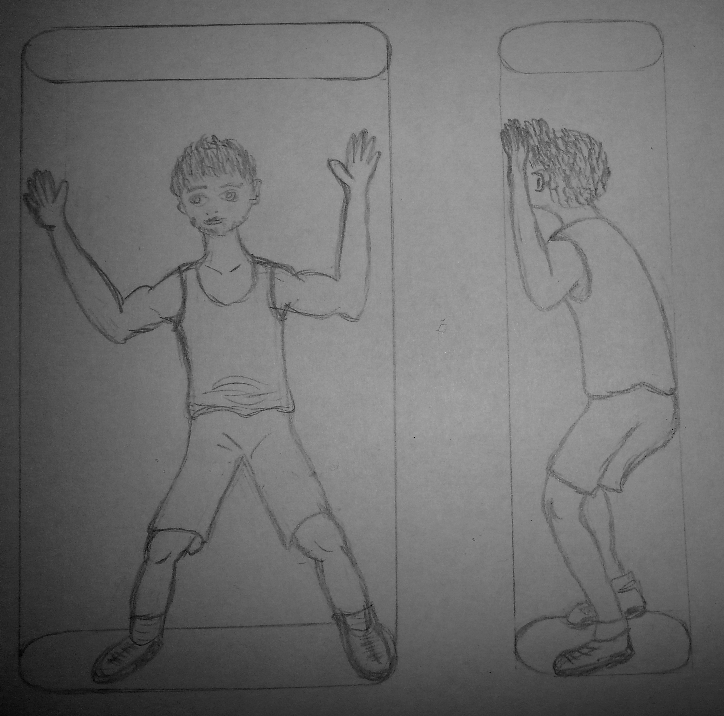 Zilustrowanie zasady cylindra w koszykówce, na podstawie przepisów FIBA 2012